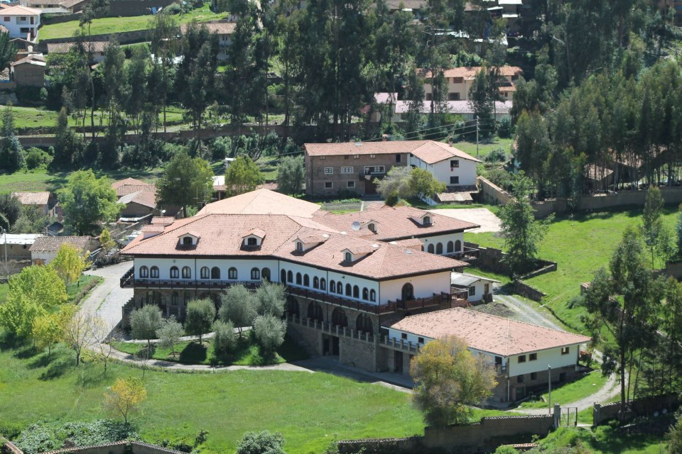 Hospital Mama Ashu, construido con el apoyo de la Operación Mato Grosso y el Movimiento Juvenil de Italia